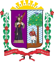 Escudo de la parroquia José Gregorio Bastidas. Municipio Palavecino. Estado Lara. Venezuela